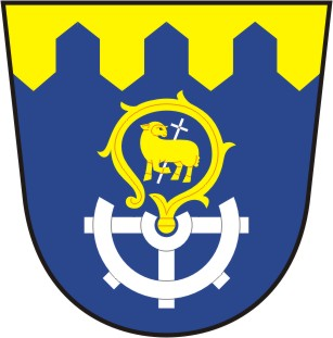 znak obce Počaply